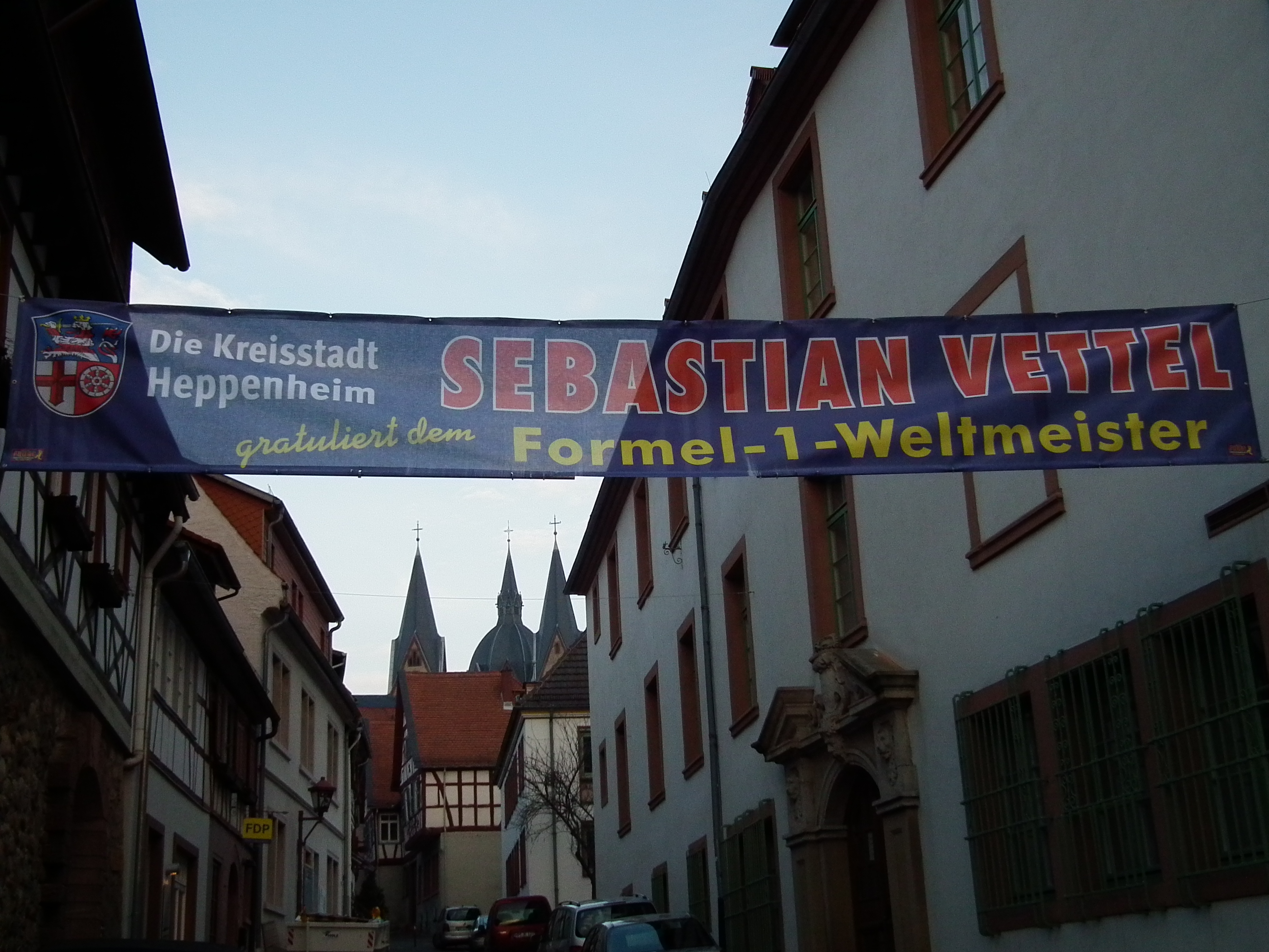 Transparent der Stadt Heppenheim als Gruß an den Formel-1-Weltmeister Sebastian Vettel (Hessen, Deutschland)